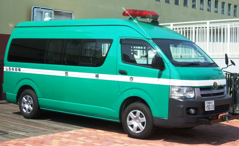 Toyota Hiace.